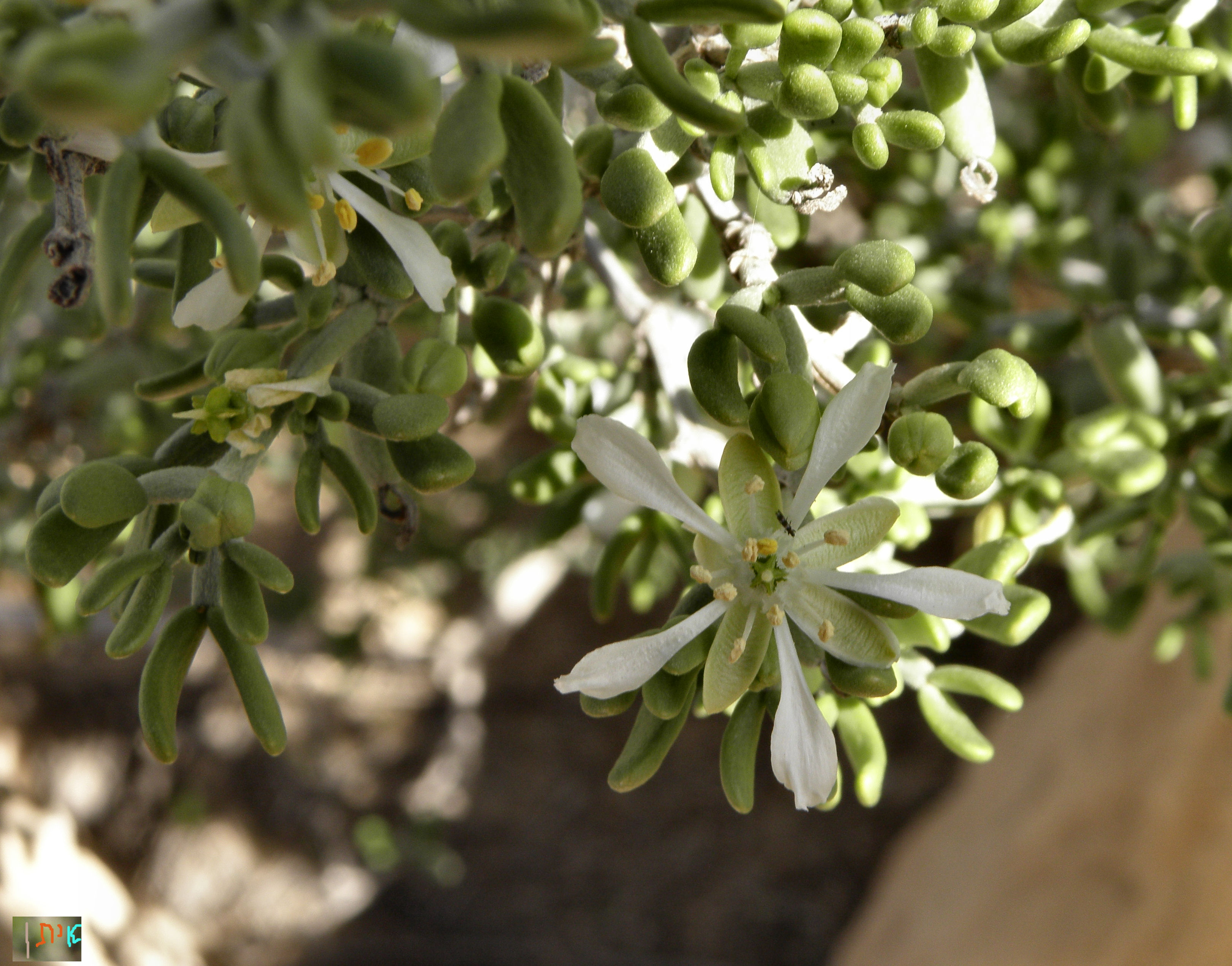 Zygophyllum dumosum, Negev זוגן השיח, שיבטה